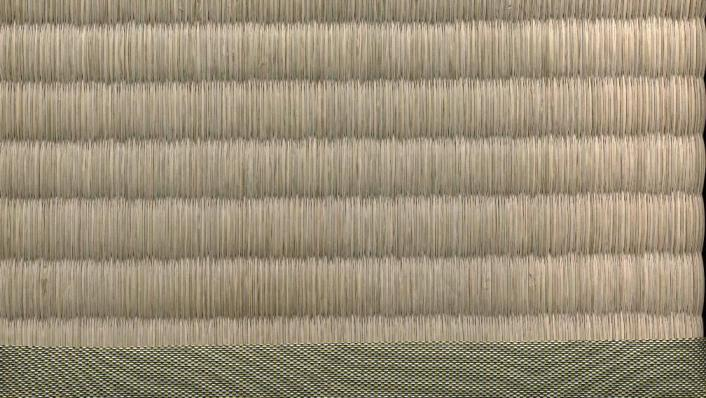 Tissus de paille recouvrant le tatami. On distingue aussi le bandeau recouvrant l'arrête longitudinale.